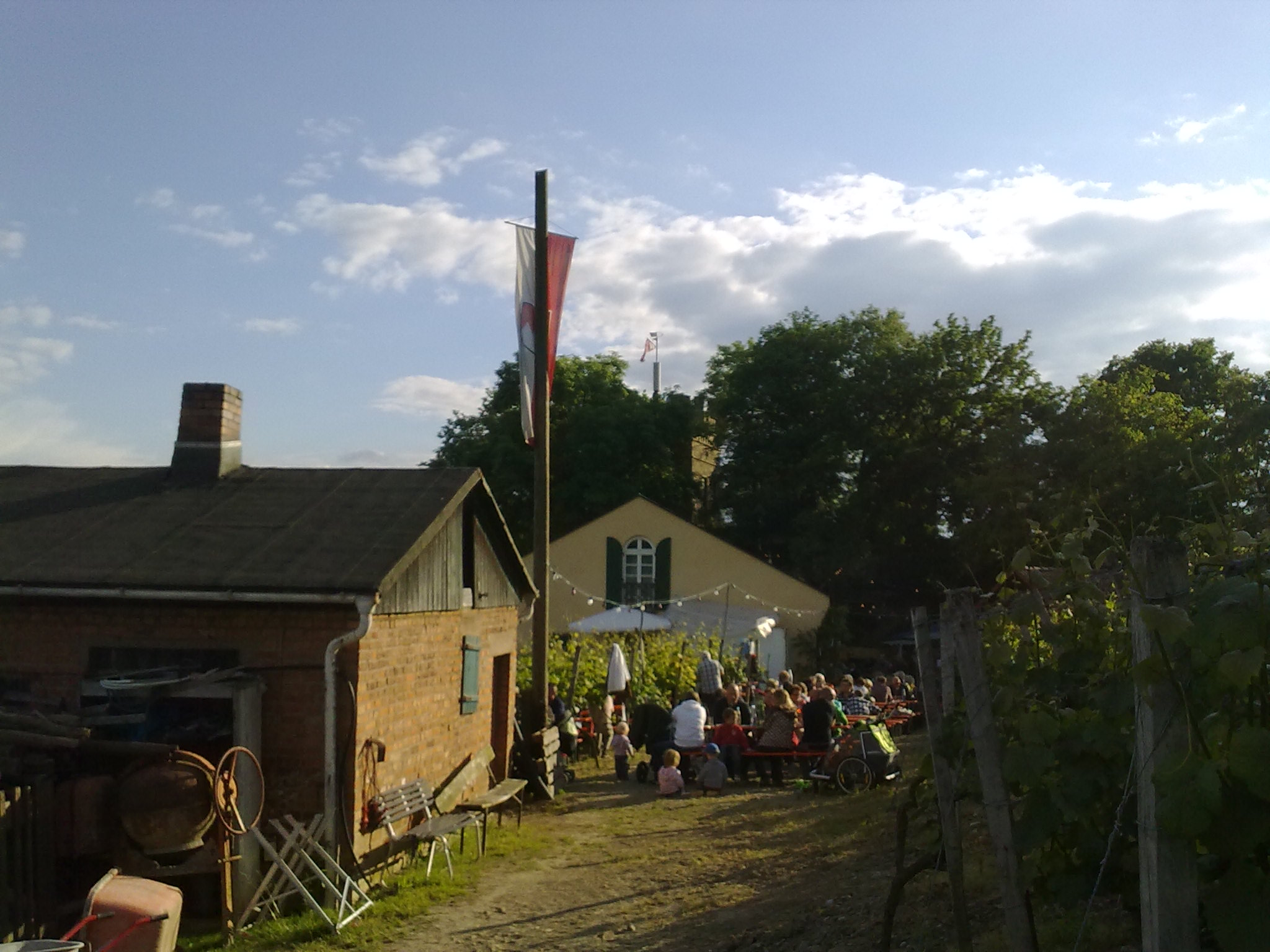 Weinberg Peterstirn